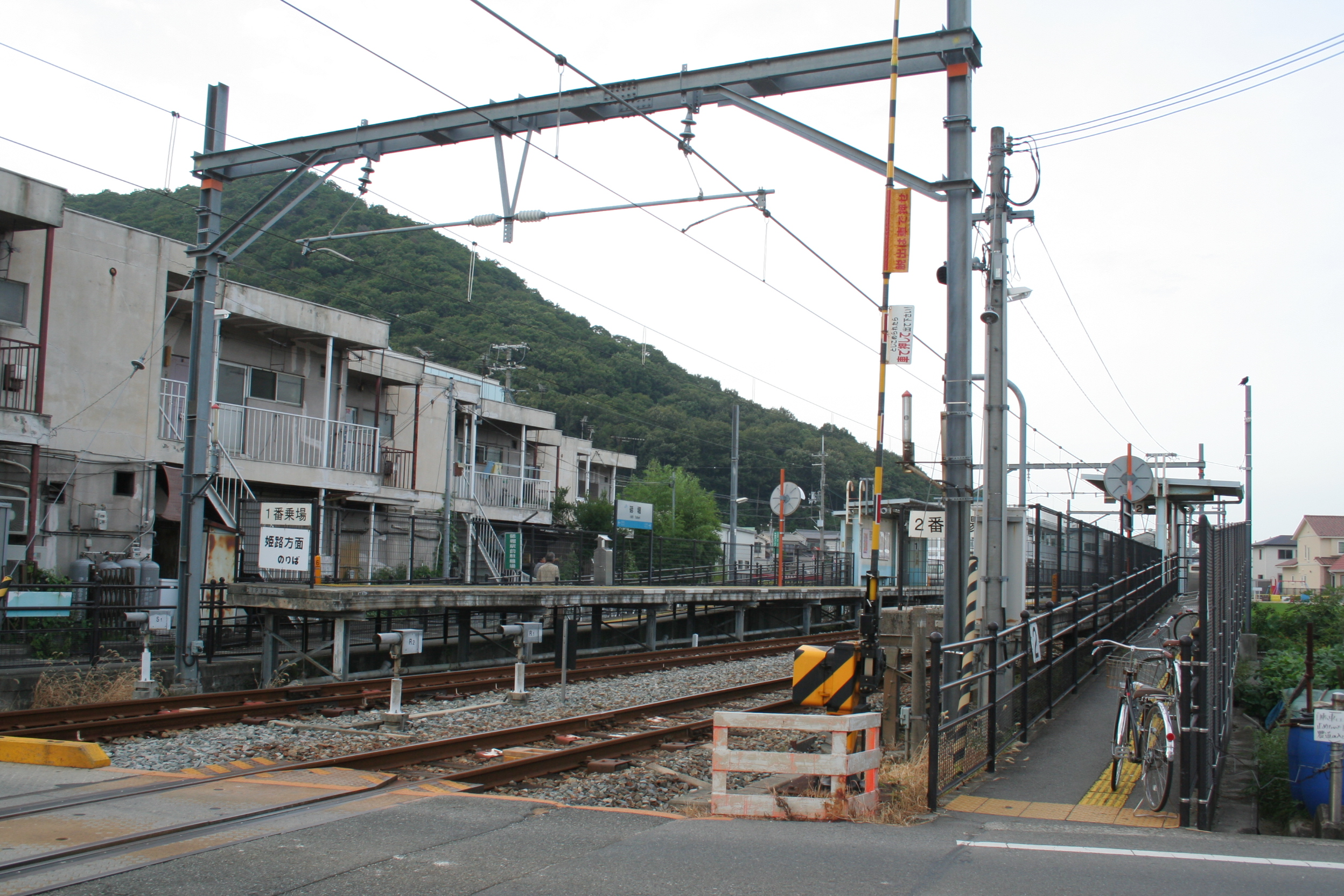 砥堀駅。播但線の鉄道駅。 駅への出入り口。砥堀駅の出入り口は非常に狭く、駅の南側の踏み切りの横から出入りするしかない。自転車置き場はあるが、自動車を置くスペースは無い。